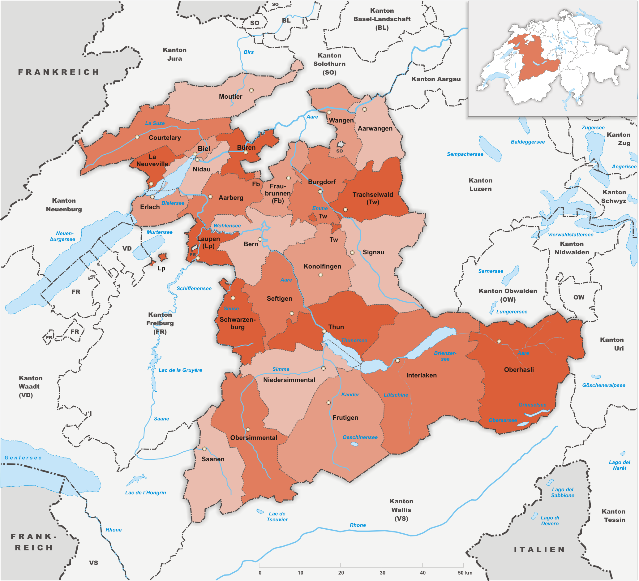 Amtsbezirke des Kanton Bern bis 2009